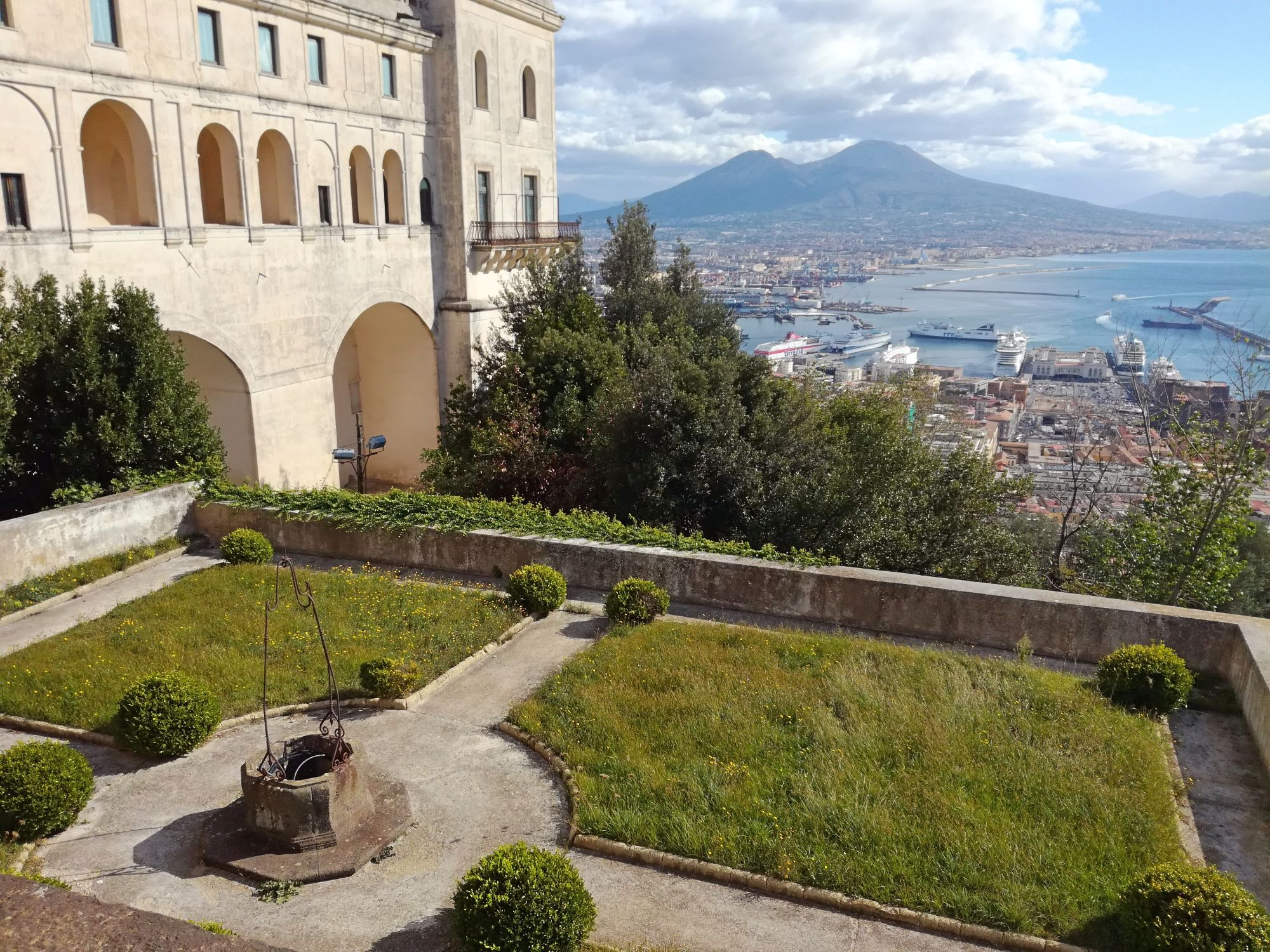 Giardino del Priore e veduta